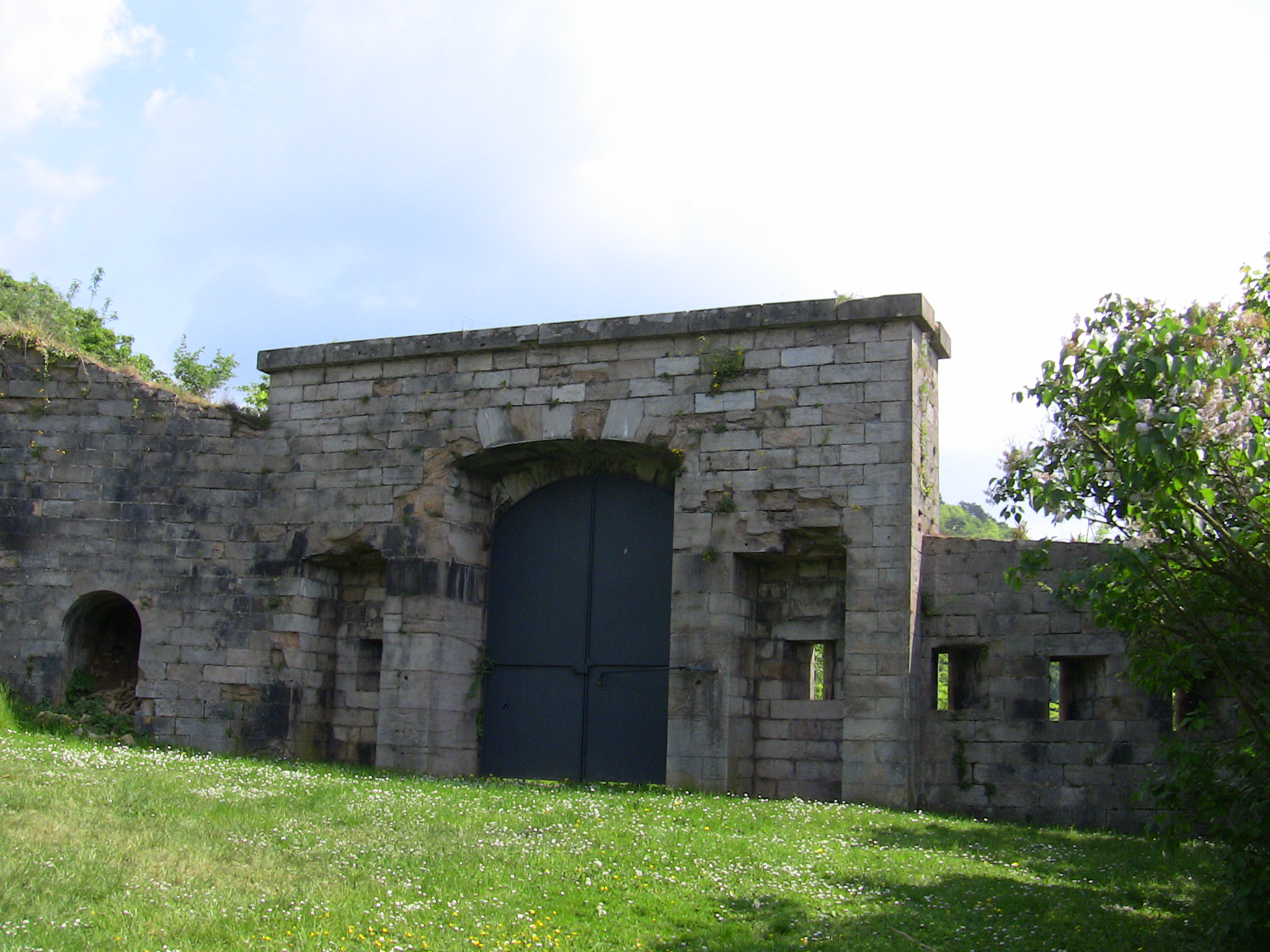 La porte charretière du fort de Beauregard à Besançon (Doubs, France).